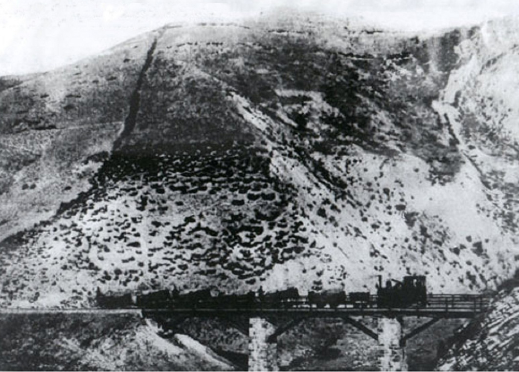 Treno in transito sul ponte sul fiume Morello